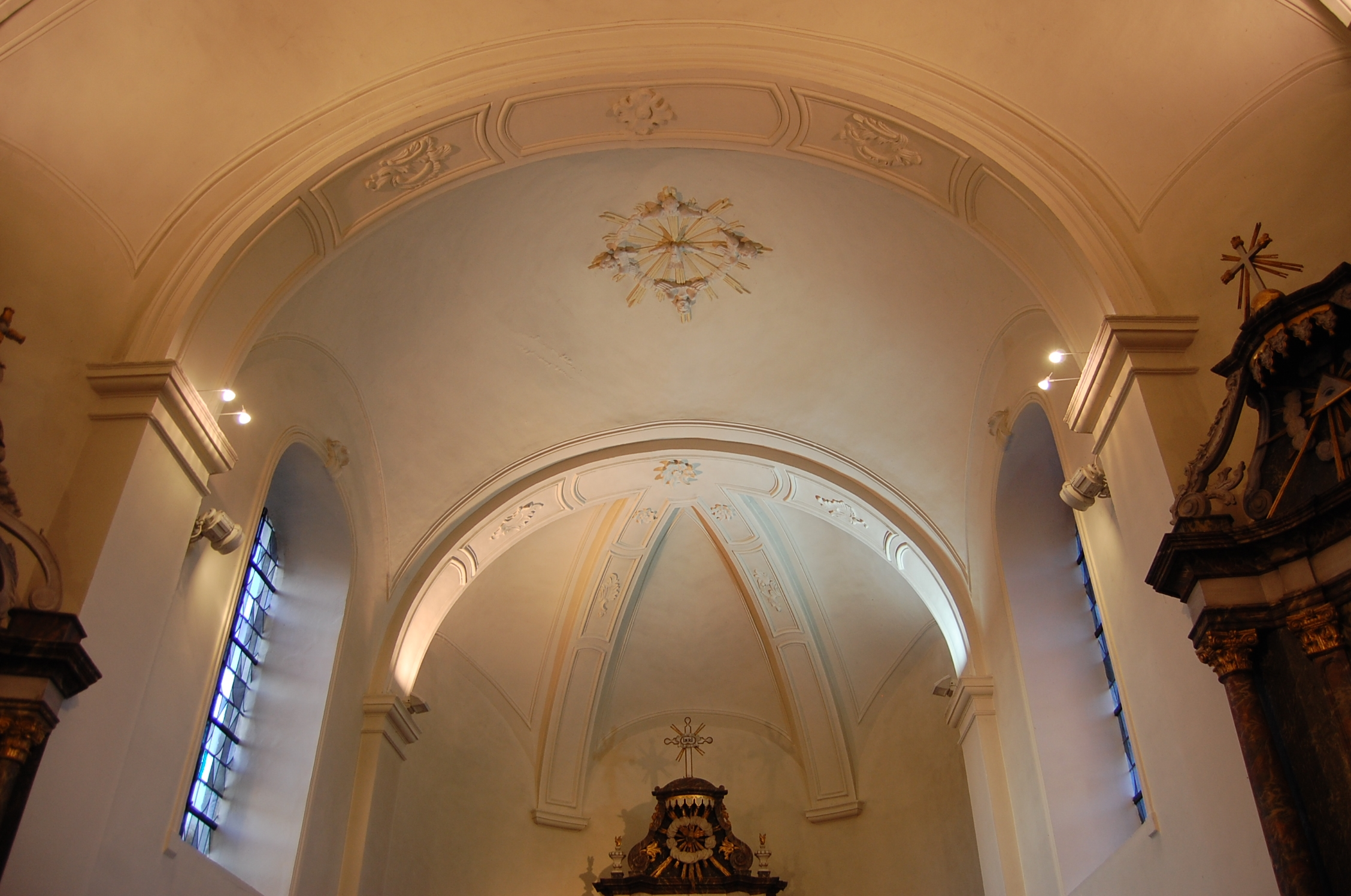 Eglise Notre-Dame de la Nativité. Chœur et abside. Voûtement